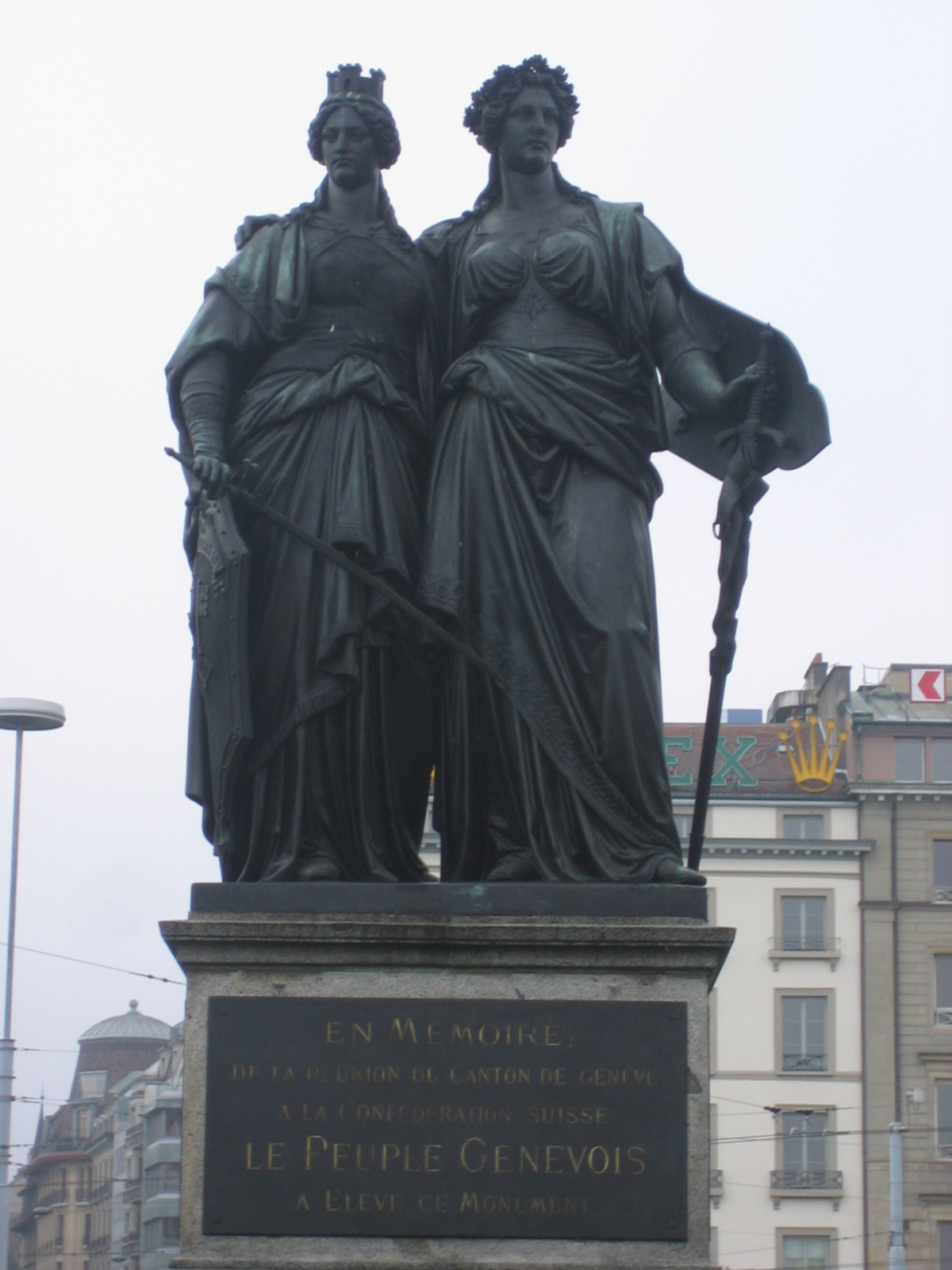 Statue commémorant l'entrée de Genève dans la Confédération suisse au Jardin anglais